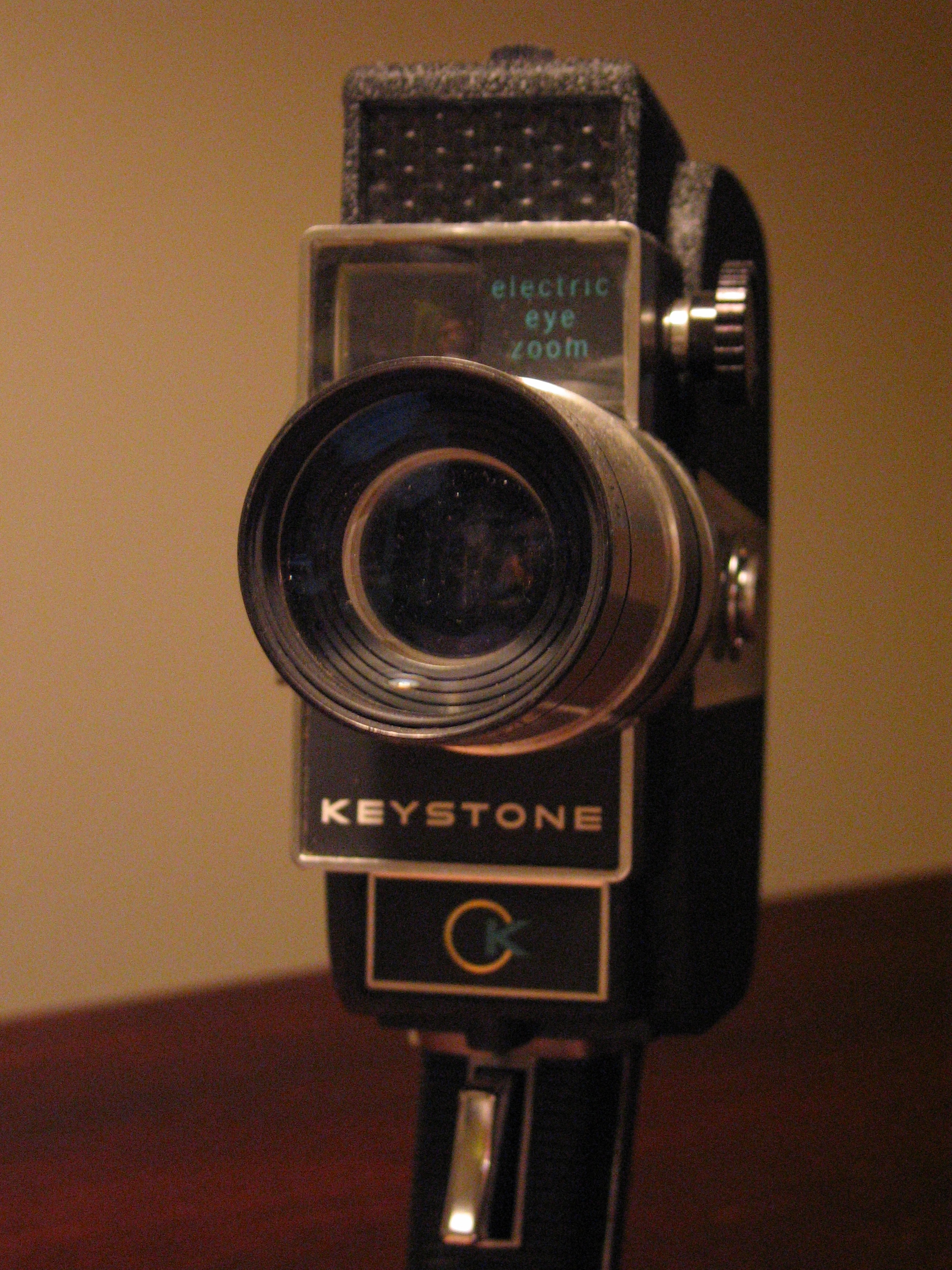 Keystone Super-8 movie camera, lens detail